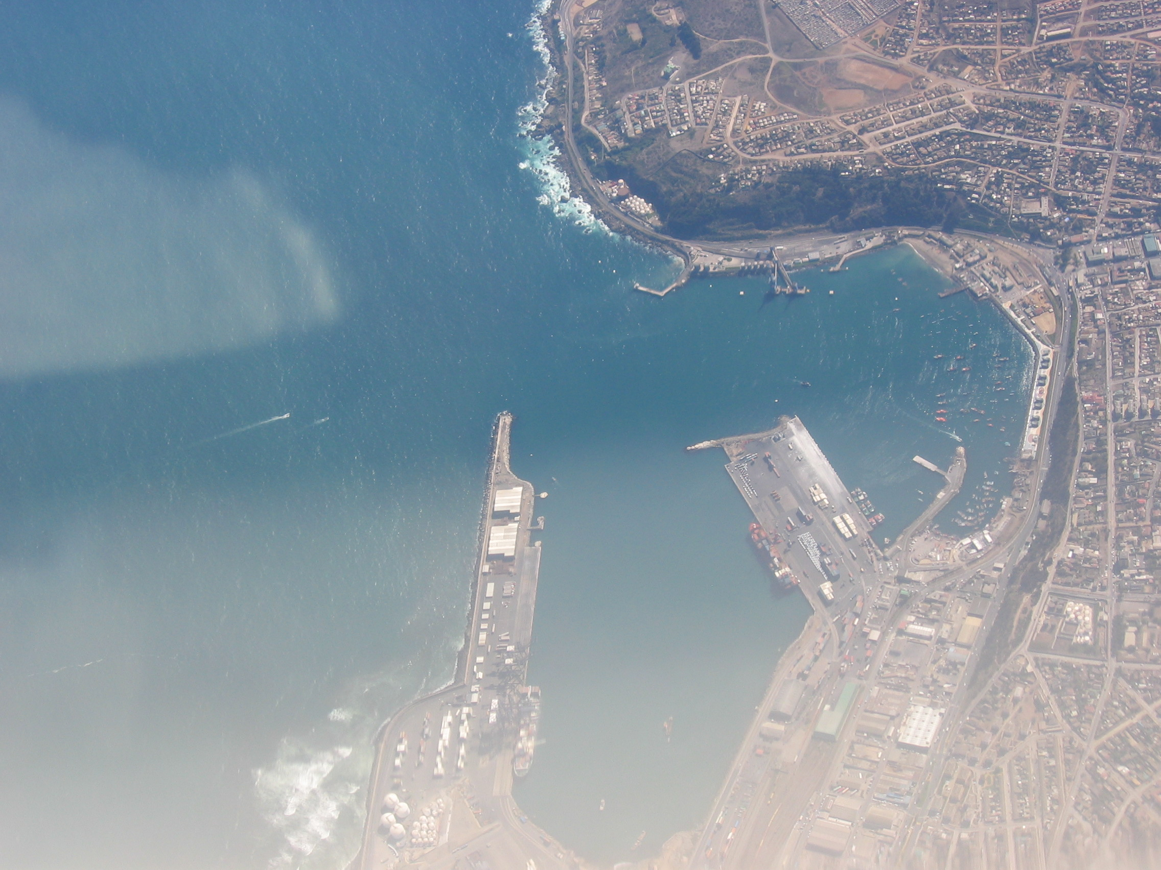 Es el Puerto de San Antonio. Perdon por los reflejos, pero fue tomada desde una avioneta... It's the San Antonio Port. Sorry for the reflections, it was taken from a plane. Autor: Serpentus